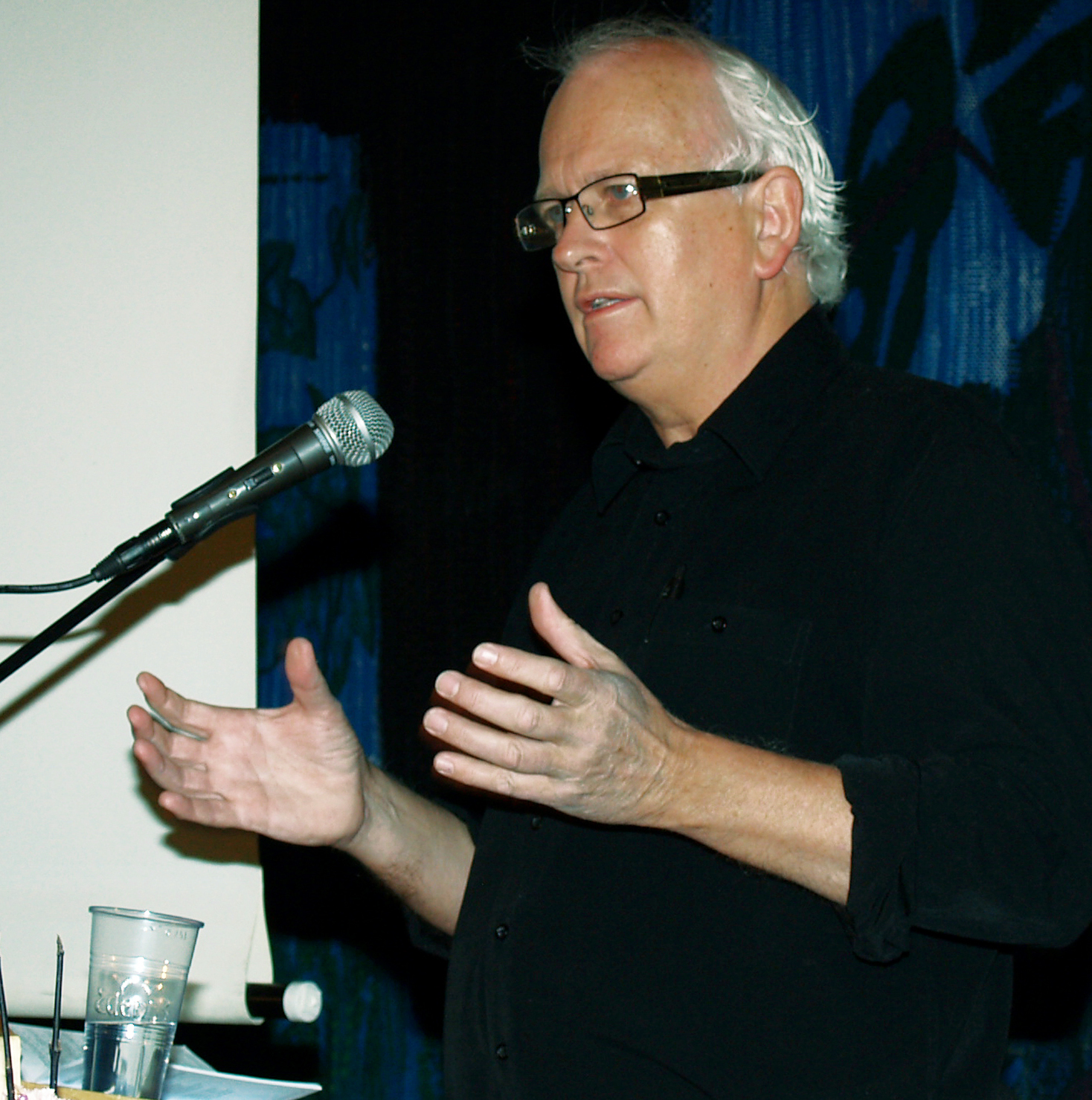 Forfatter og prest Eyvind Skeie under Kirkemøtet 2008.